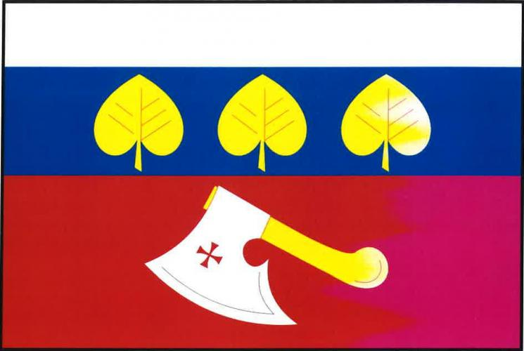 vlajka, Žeretice, okres Jičín